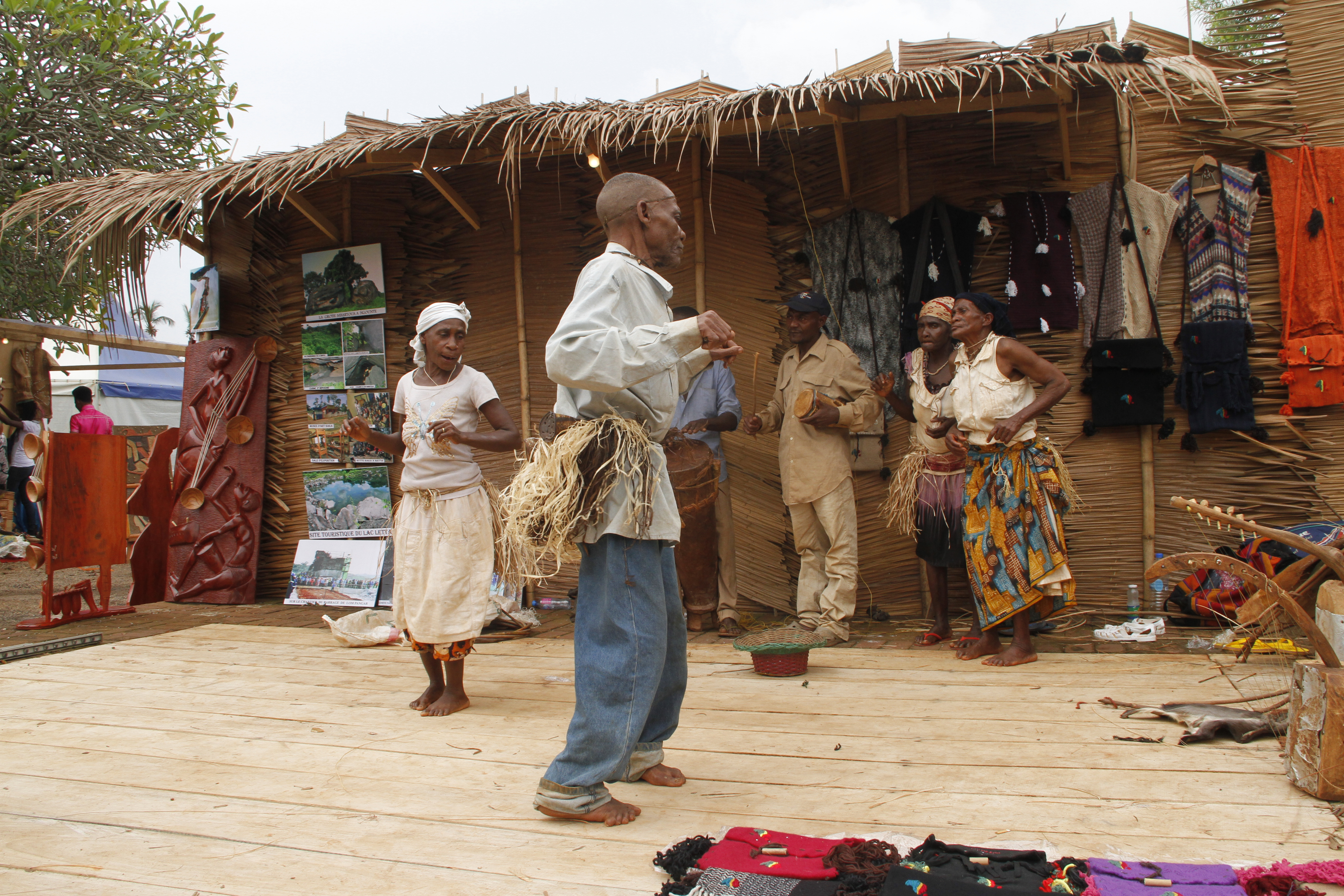 Danseurs pygmées du Sud du Cameroun pendant le Fenac (Festival des arts et de la culture) à Yaoundé au Cameroun This is an image from Cameroon